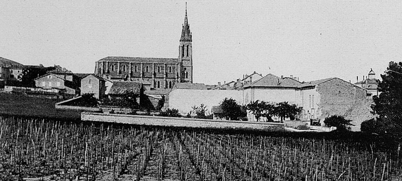 Dictionnaire illustré des communes du département du Rhône. Tome 1 / par MM. E. de Rolland et D. Clouzet.